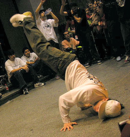 Enfrente de Zara, Gran Vía, Madrid.